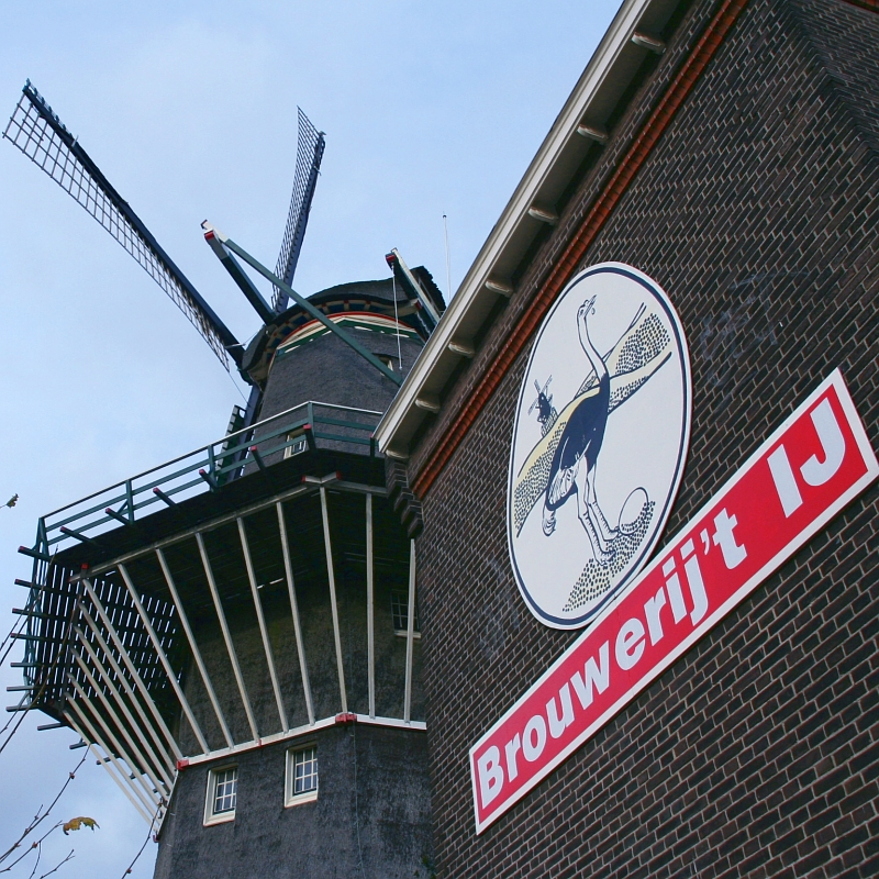 De Gooyer Molenen Brouwerij 't IJ